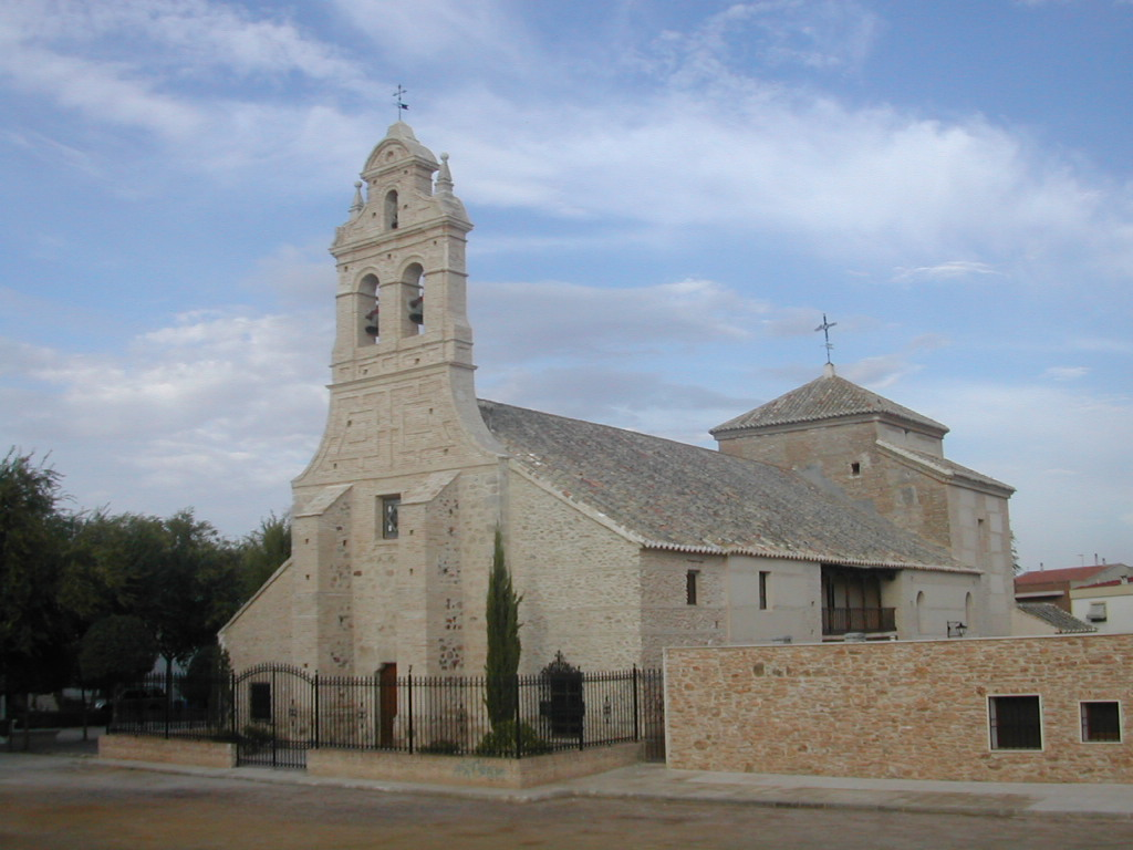 Ermita del Santísimo Cristo del Consuelo, Patrón de Torralba de Calatrava